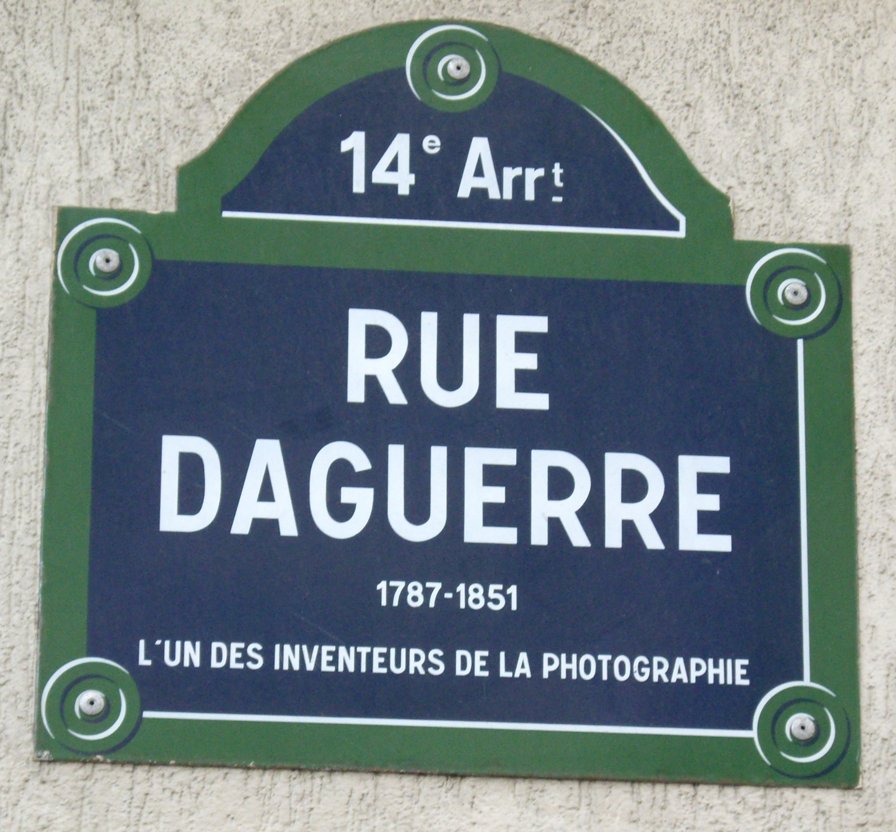 Plaque de la rue Daguerre, Paris 14e, en mémoire de Louis Daguerre (1787-1851), inventeur du daguerréotype.